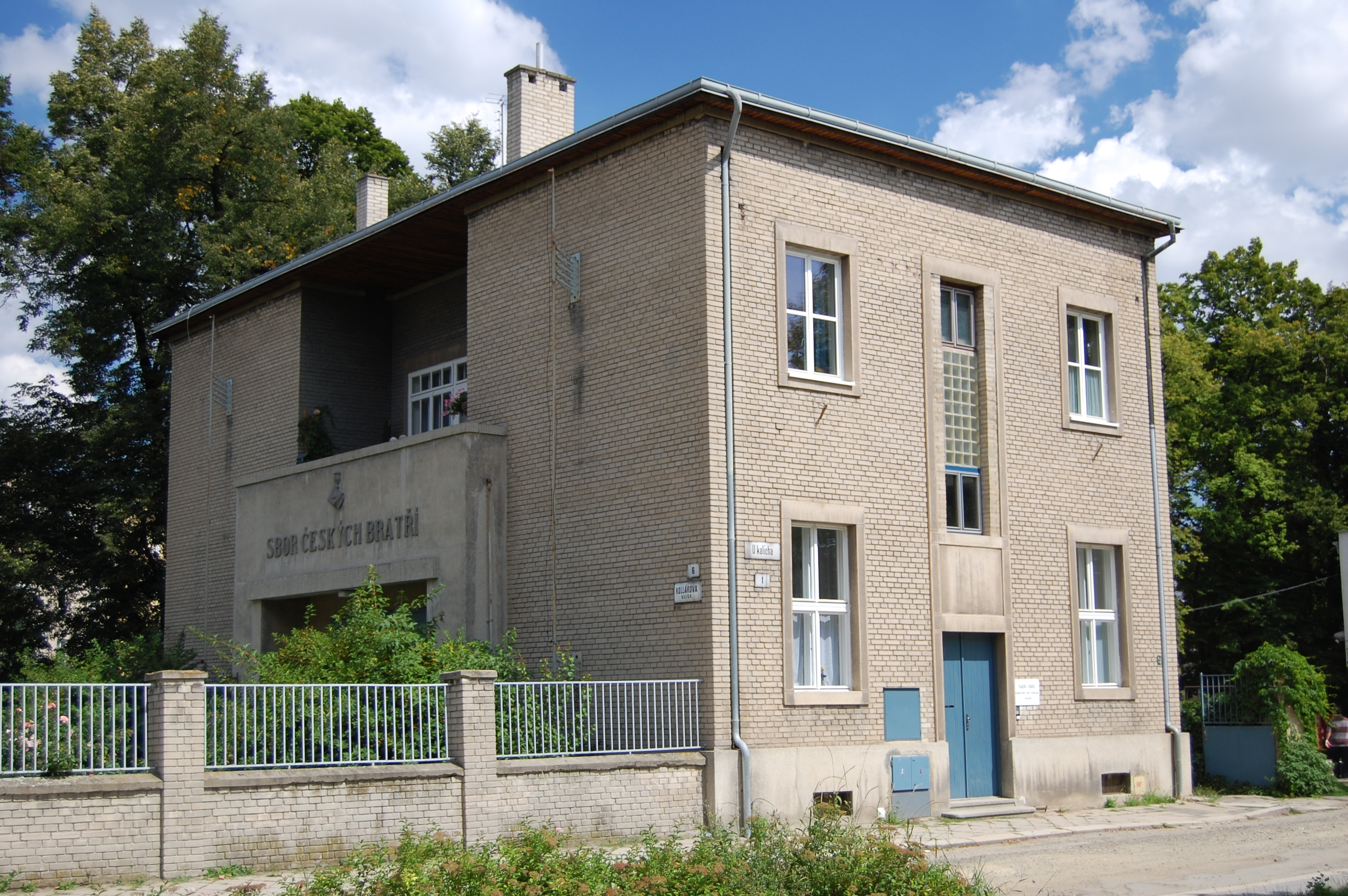 Husův sbor - boční pohled, Prostějov